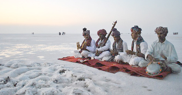 Rann Utsav Begins